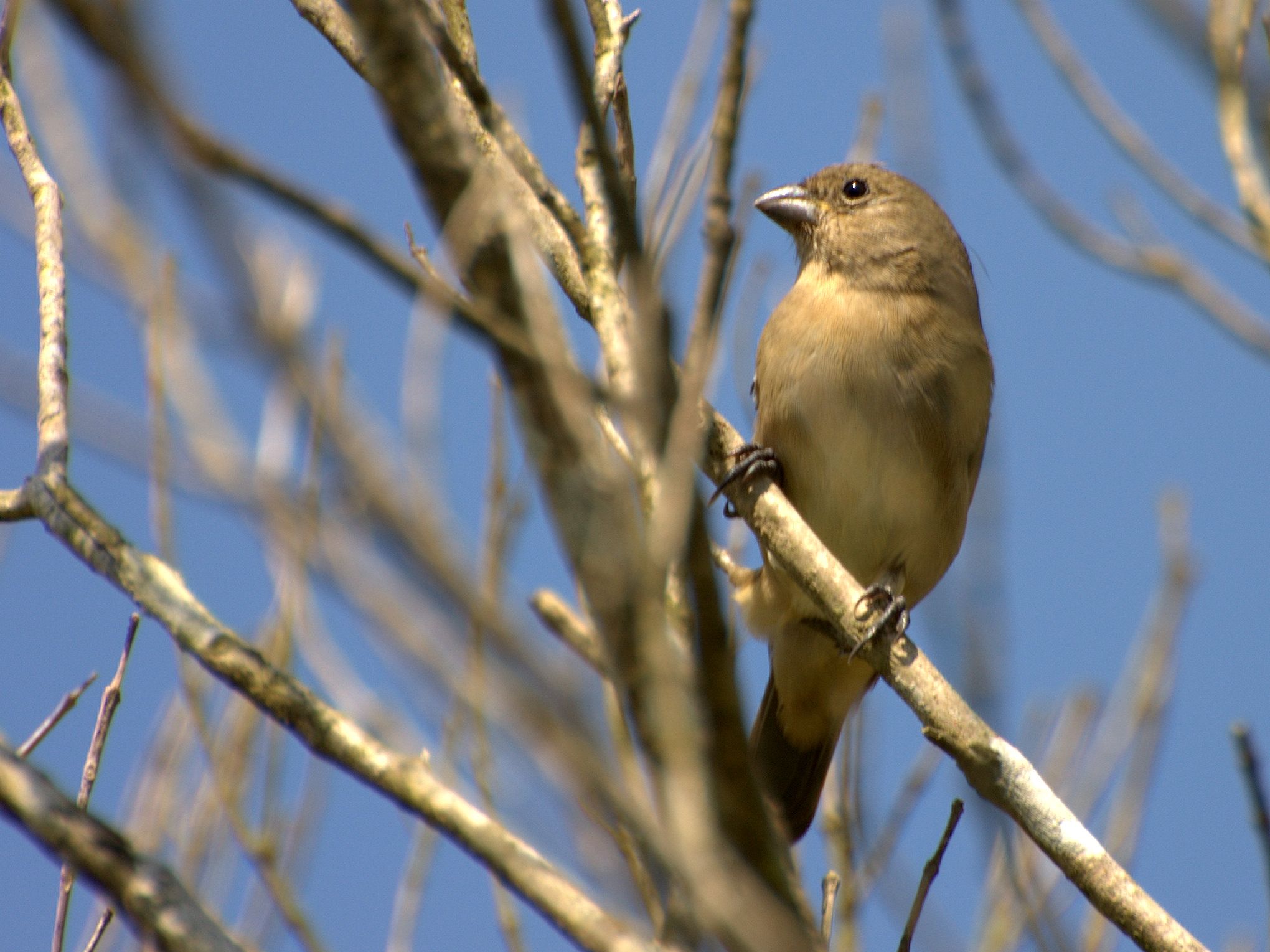 Mogi das Cruzes-SP